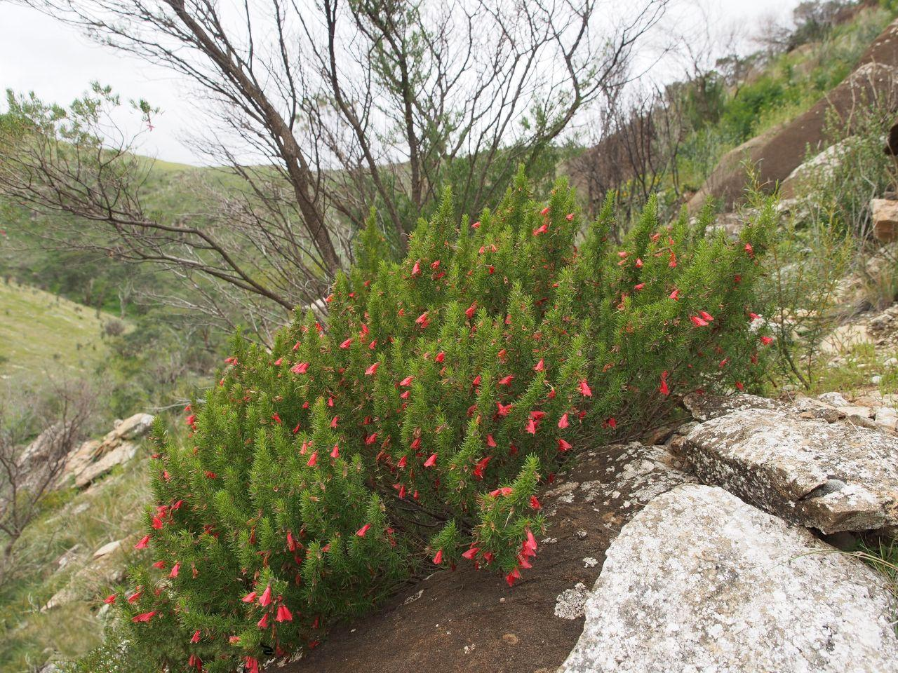 Prostantera aspalathoides Vista en su hábitat.